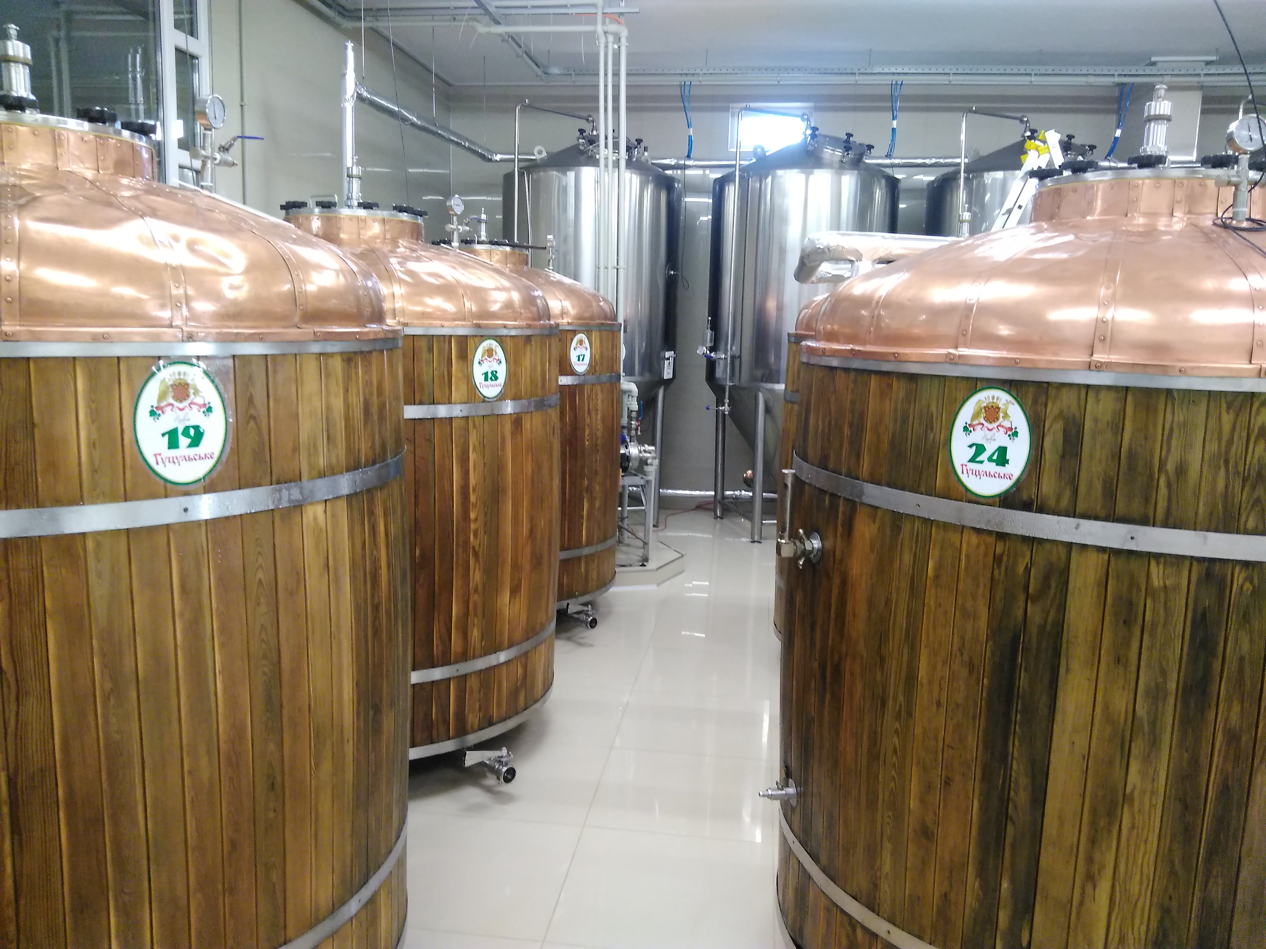 В 2019 році броварня "Микуличин" обновила виробниче обладнання в залі дозрівання